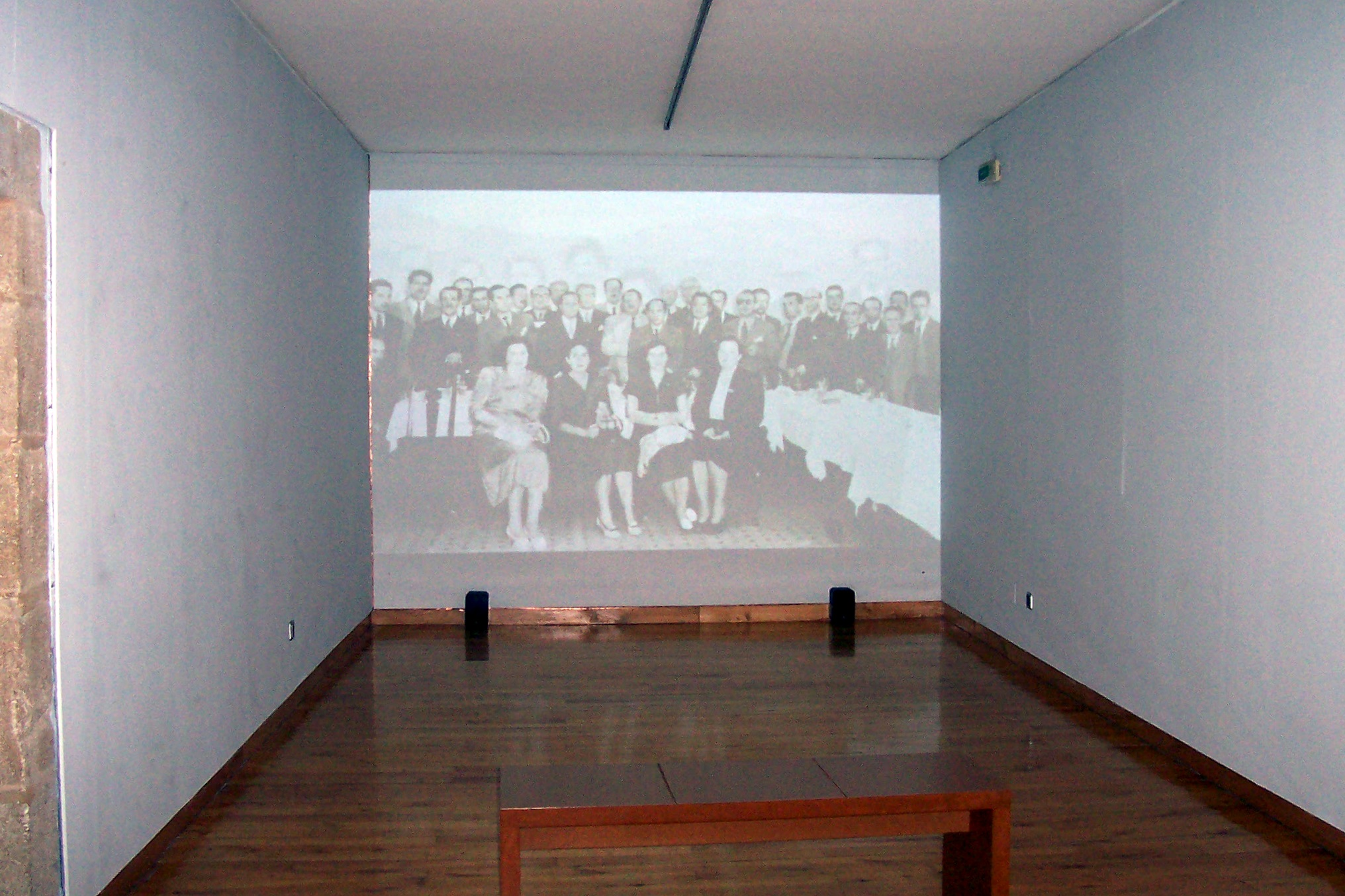 proxeción dun documental nunha parede no Museo do Pobo Galego.